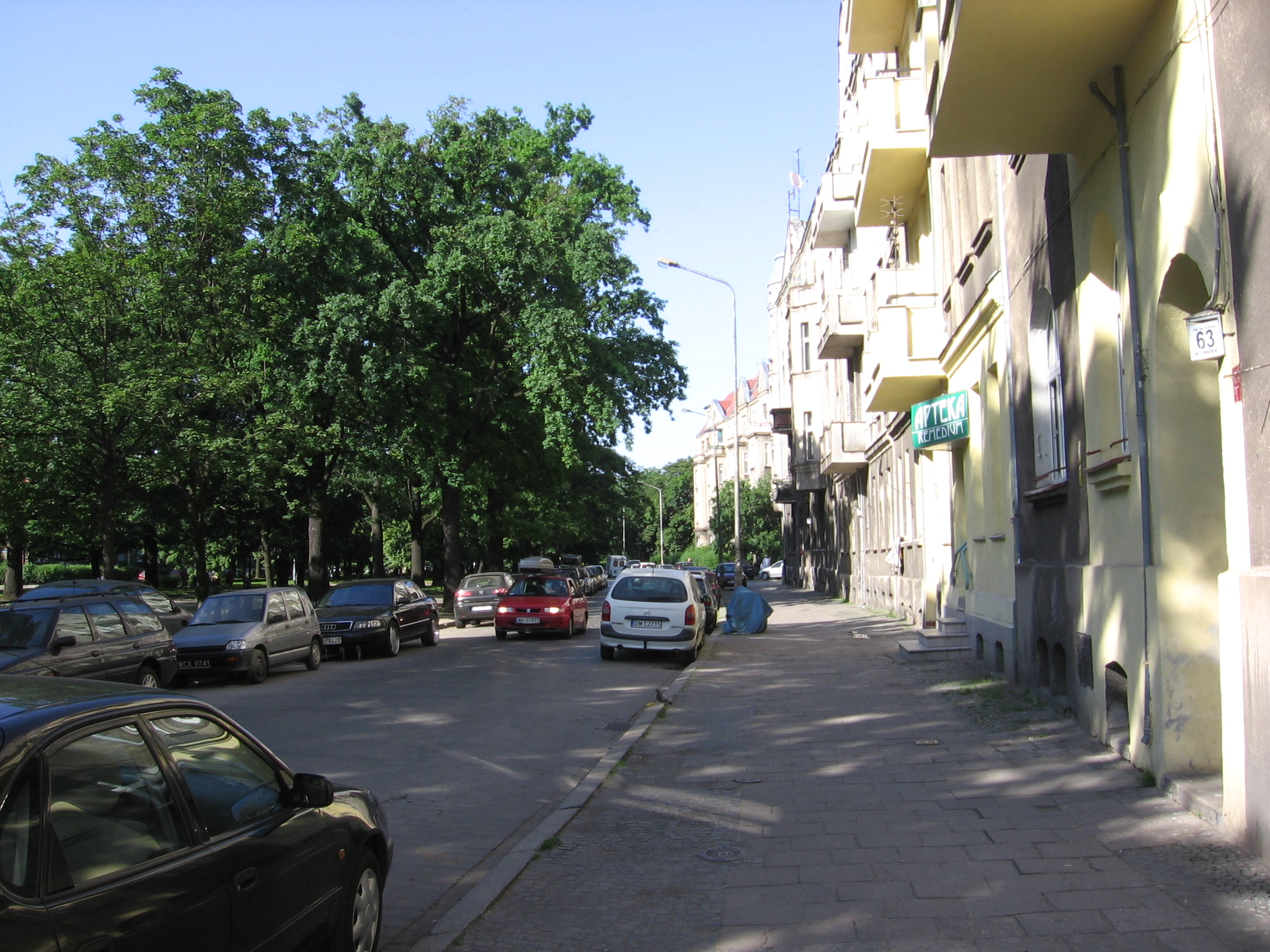 północny fragment ulicy Prusa we Wrocławiu widziany ze skrzyżowania z ul. Nowowiejską